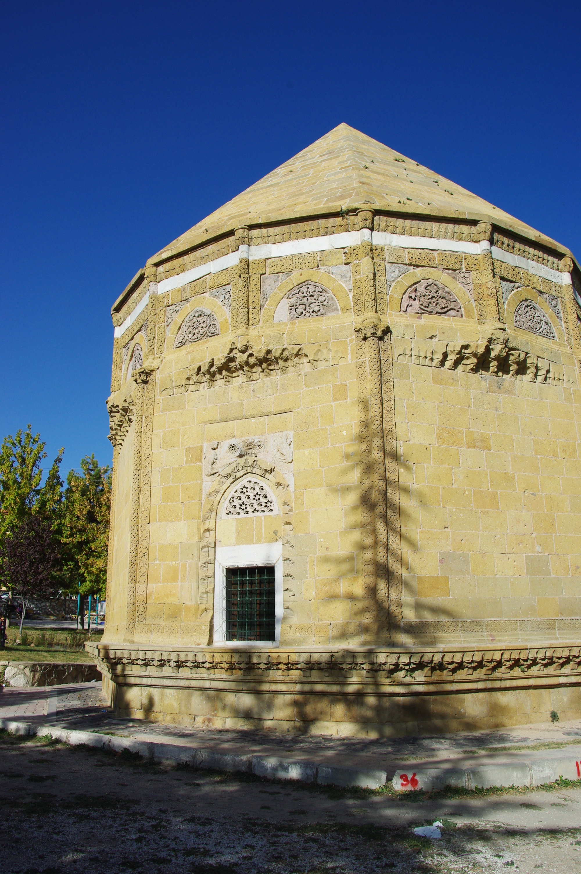 Niğde, Turkey 2009-10-16